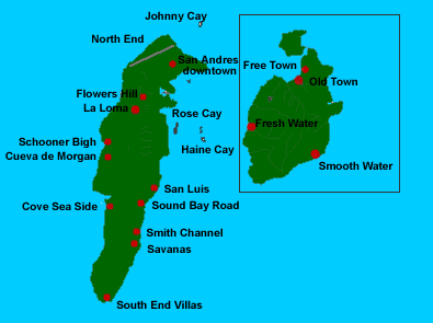 Archipiélago de San Andrés, Providencia y Santa Catalina, Colombia. Image depicting map of San Andres and Providencia and its towns, islands of the REPUBLIC OF COLOMBIA. Created by me for wikipedia and sister projects only.--F3rn4nd0 22:14, 29 January 2007 (UTC)